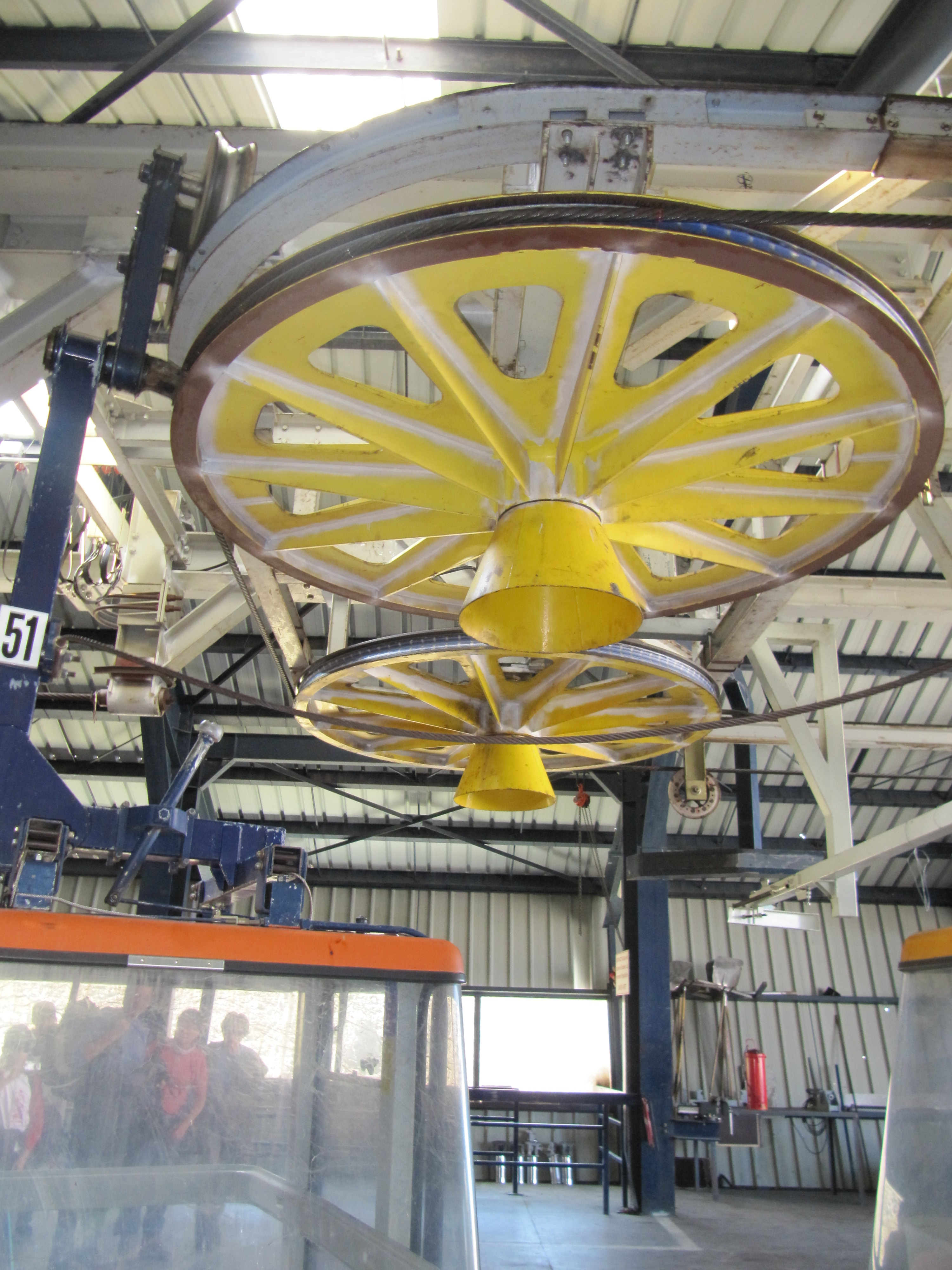 Les 2 poulies retour du premier tronçon du 2S Pulsé de la Grave